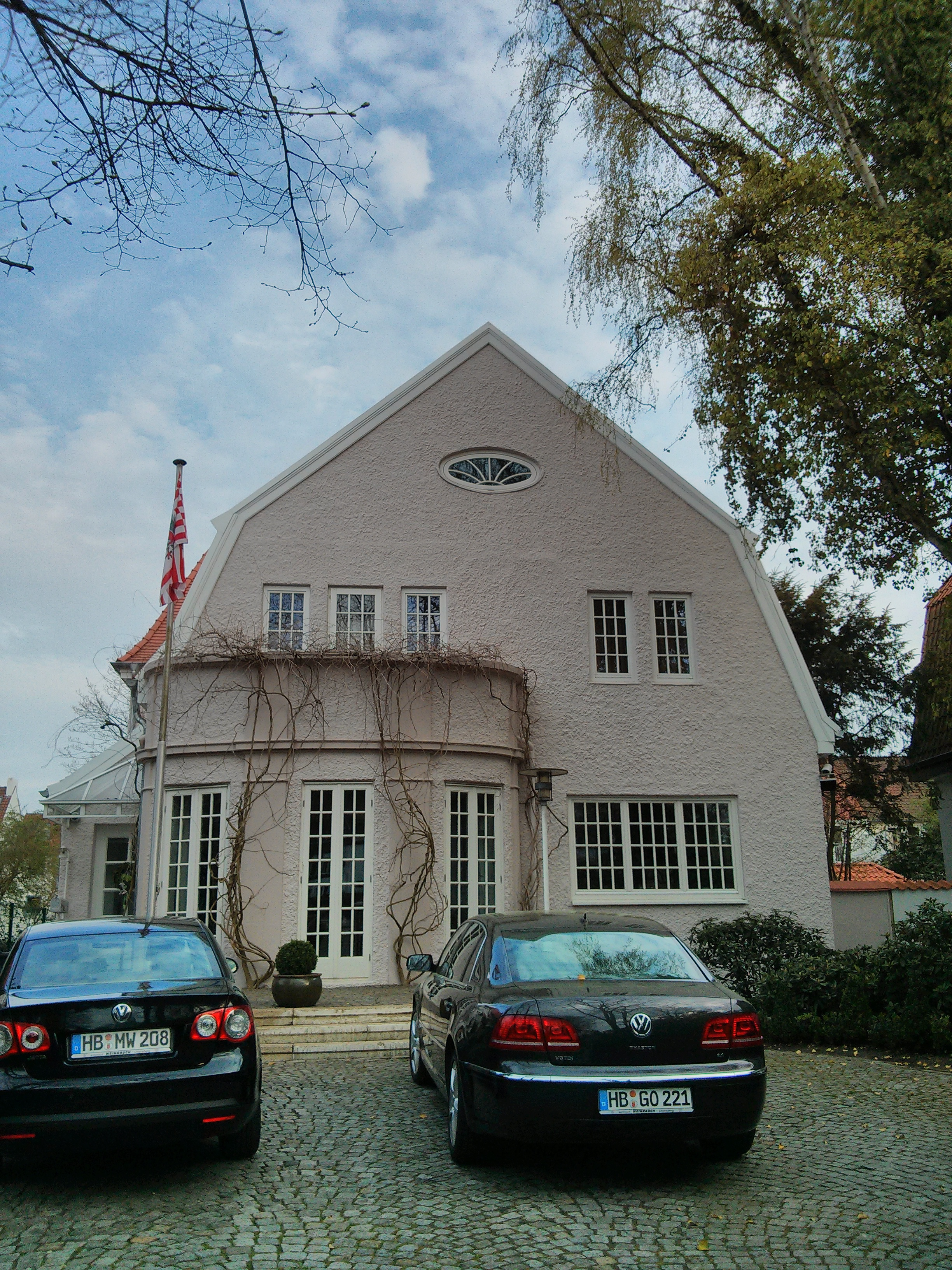 Landhaus Tack in Bremen, Schwachhauser Heerstraße 337 Das abgebildete Objekt ist ein geschütztes Kulturdenkmal in der Freien Hansestadt Bremen, mit der Nr. 1133 beim Landesamt für Denkmalpflege registriert.